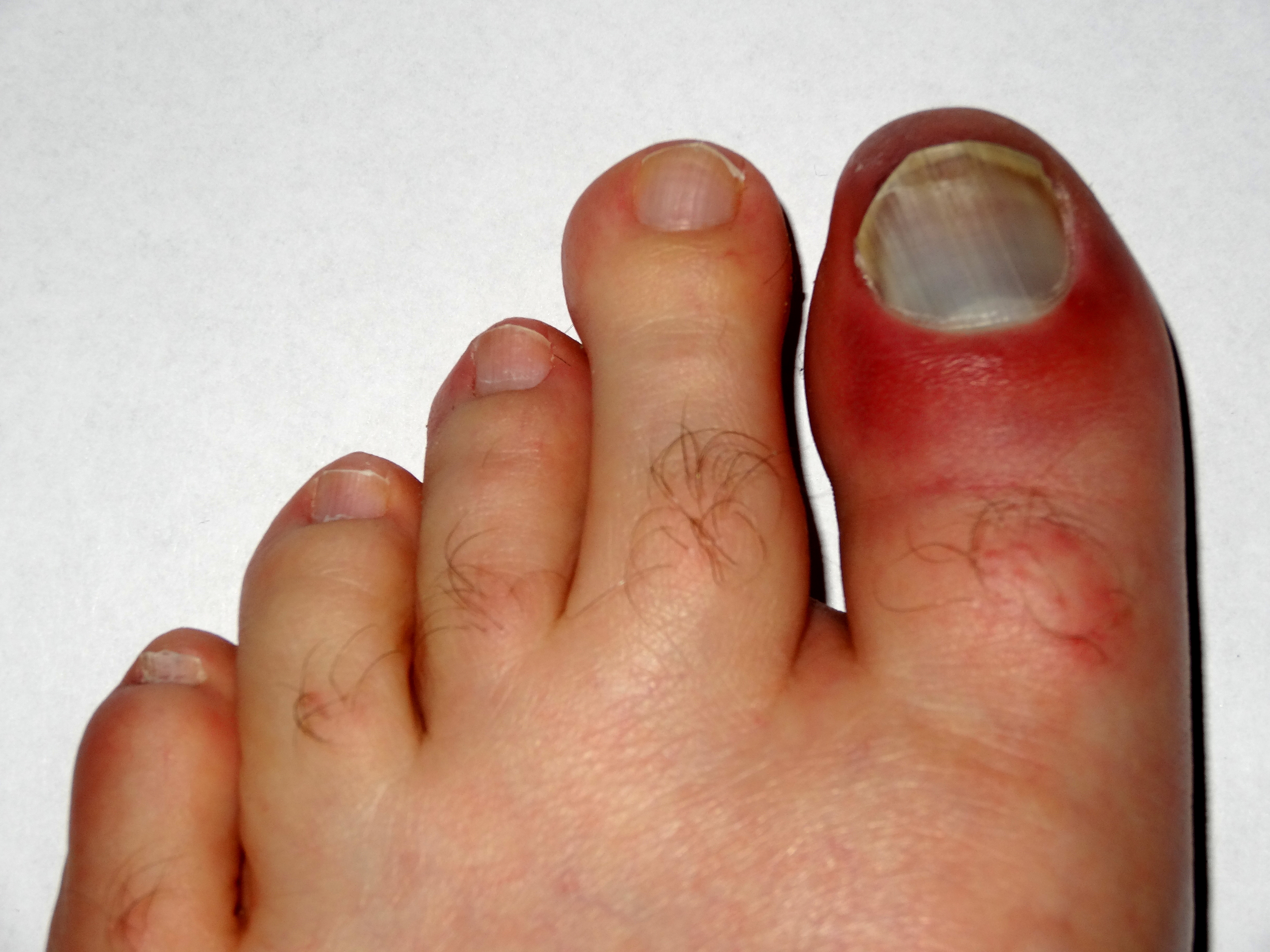 Keine Ahnung, wie die Mediziner das nennen. Dieser Zeh wurde durch eine fallende Tischplatte etwas angeknackst. Das Blut wurde abgewaschen, die Schwellung ist jetzt nach drei Tagen weg. Der Nagel wird abfallen (Das Blau unter dem Nagel ist hier nicht farbgetreu). Dummerweise drückt genau dieser Zeh bei jedem Schritt gegen den Schuh, das macht immer Aua.